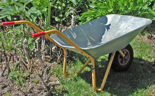 Almindelig trillebør af aluminium med små, trinde, oppustede gummihjul & håndtag, som sidder bag hjulet & to støtteben som sidder imellem hjulene & håndtagene